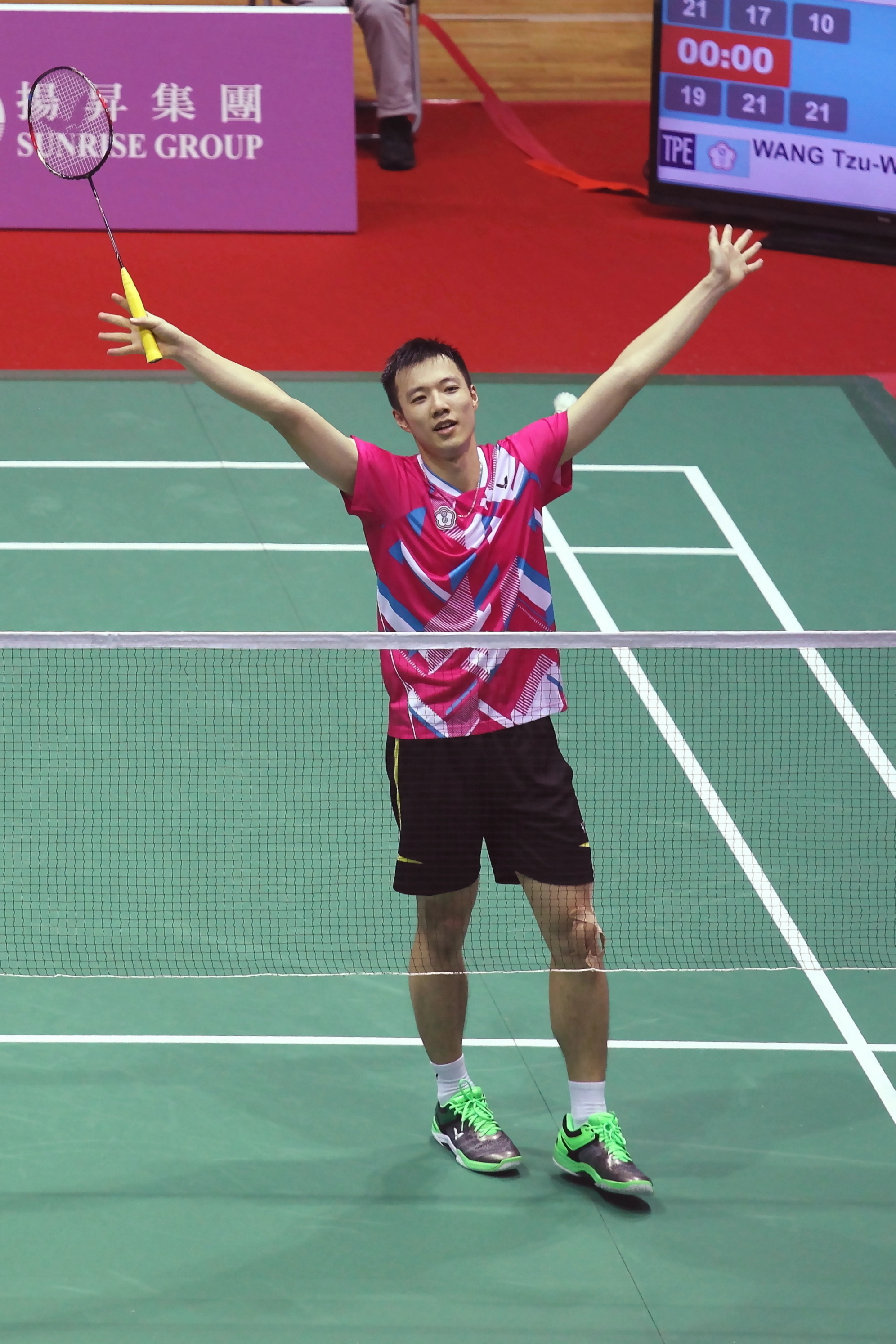 2017 台北世大運個人男單決賽 王子維 vs 西本拳太 01